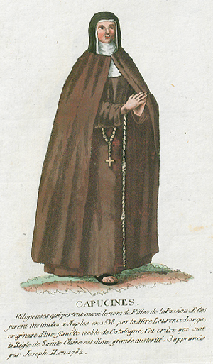 Collection de costumes de tous les ordres monastiques, supprimés à differentes époques, dans la ci-devant Belgique, Bruxelles, Philippe Joseph Maillart et sœur, 1811